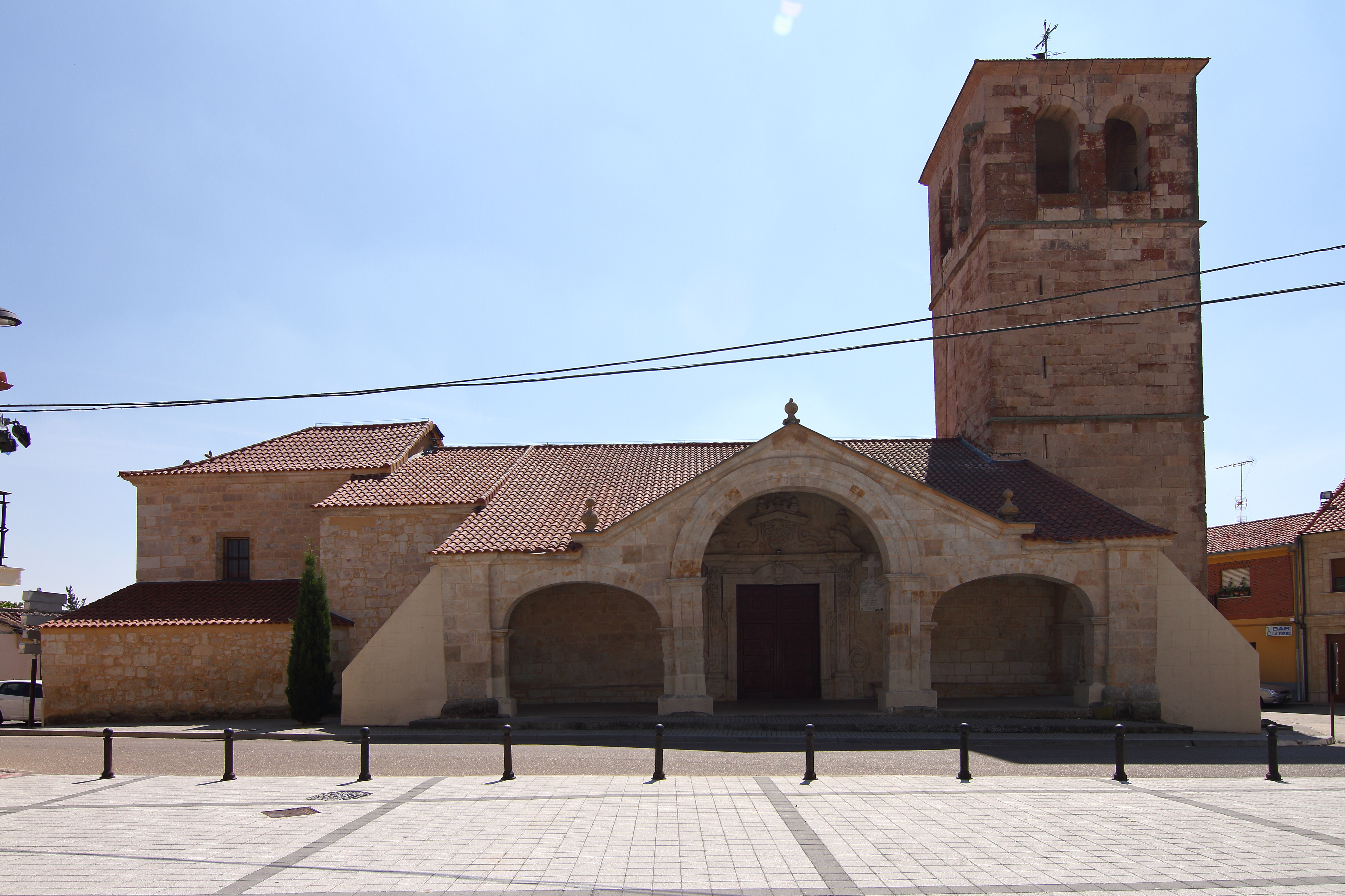 Iglesia de Santa Elena en Calzada de Valdunciel